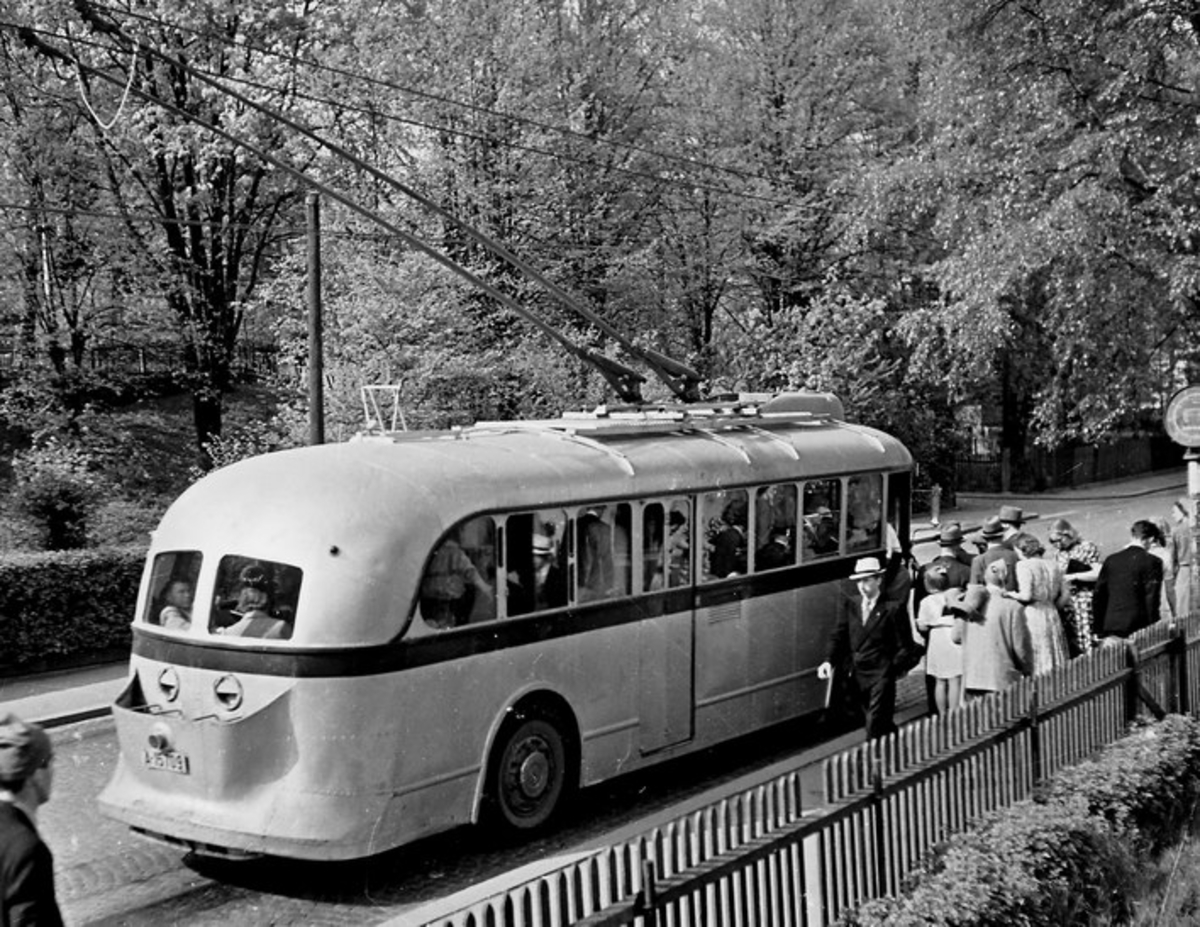 Trolleybuss fra Oslo Sporveier, ca. 1948